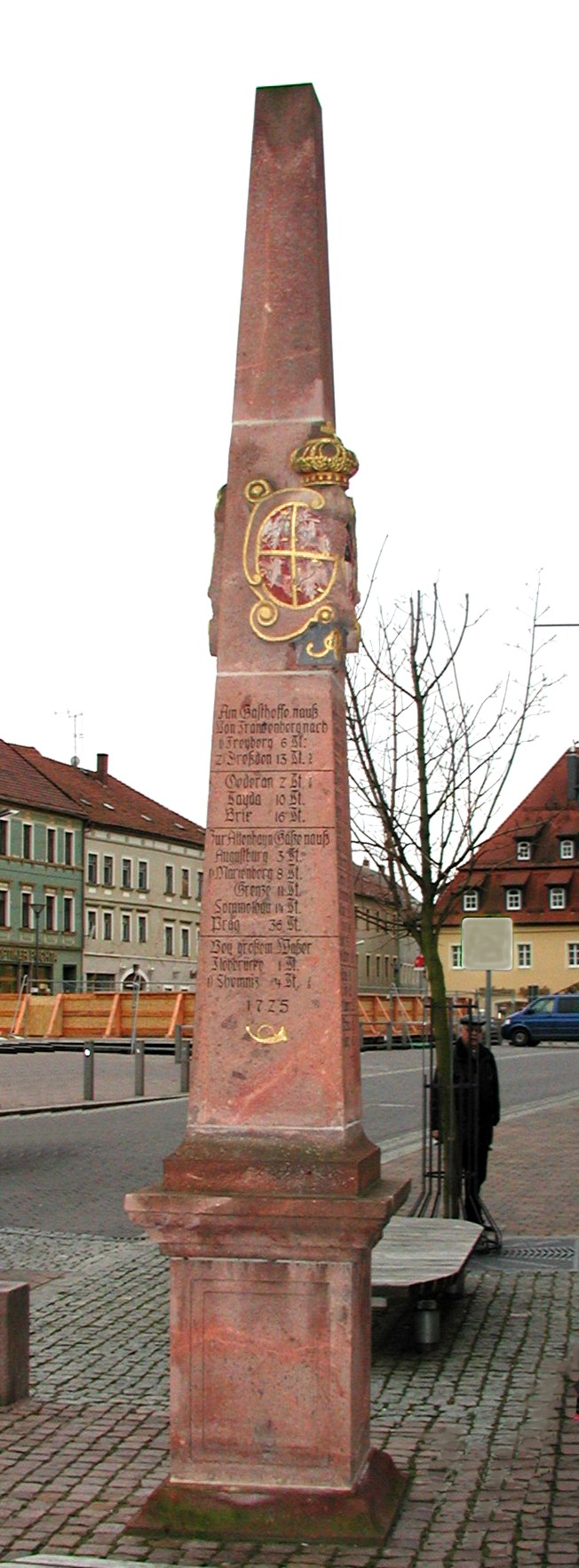 Kopie einer sächsischen Postmeilensäule am Markt.